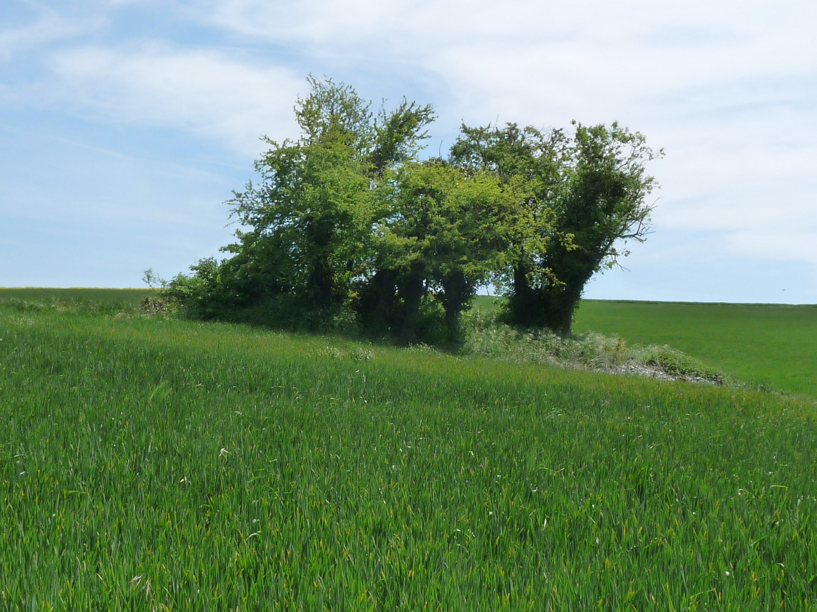 La Pierre Folle, Chenommet, Charente, France